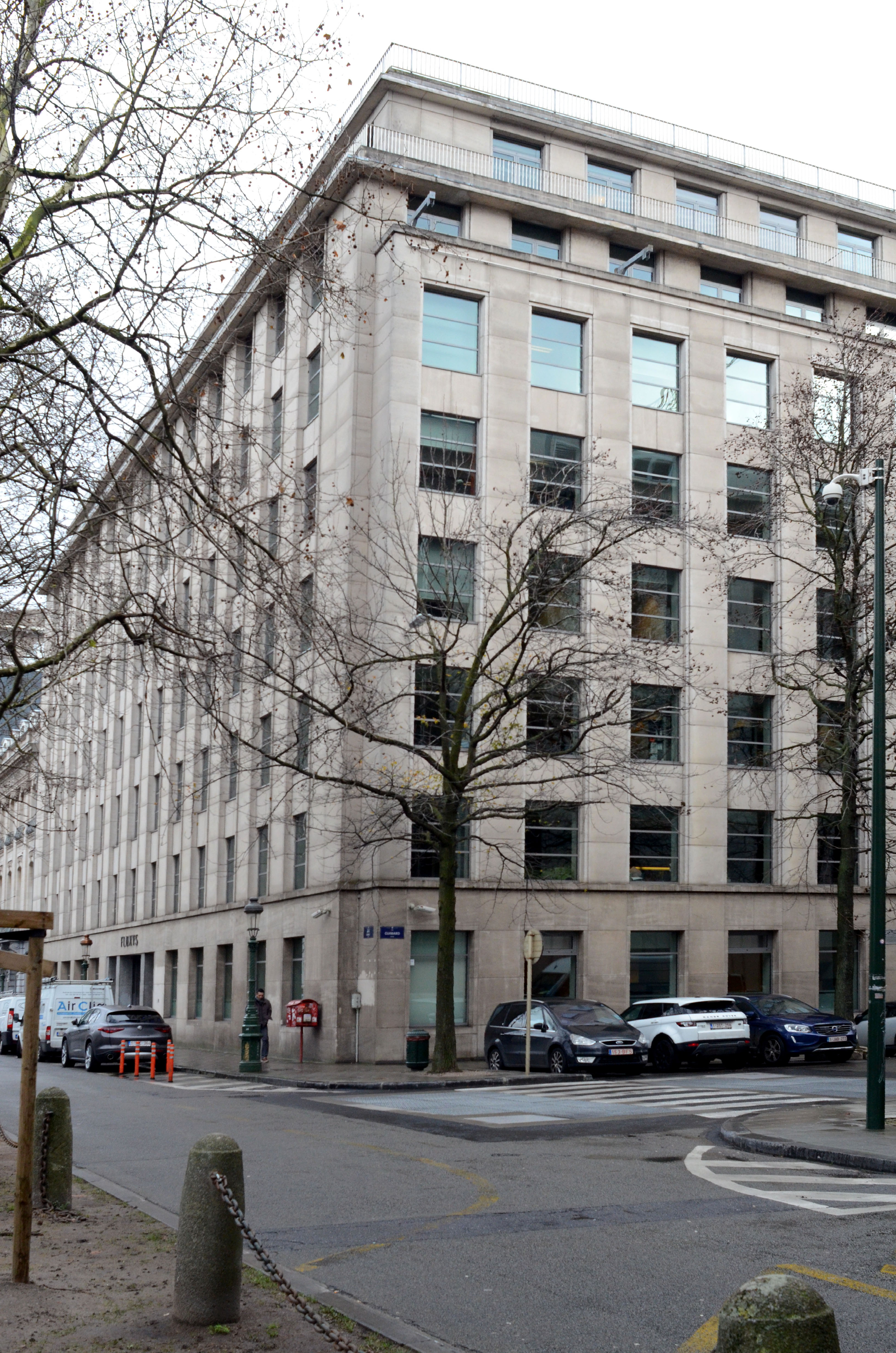 Immeuble de bureaux construit par les architectes andré et jean Polak en 1956